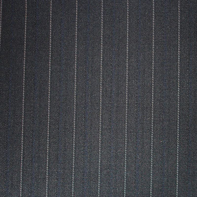 pin stripe fabric